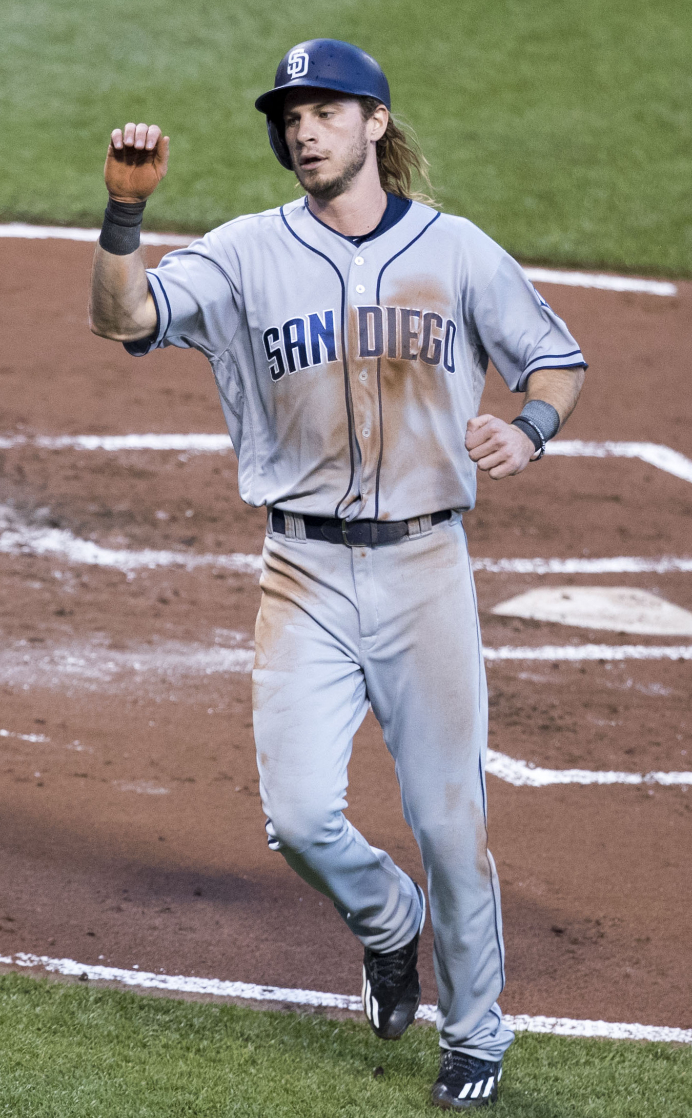 Travis Jankowski